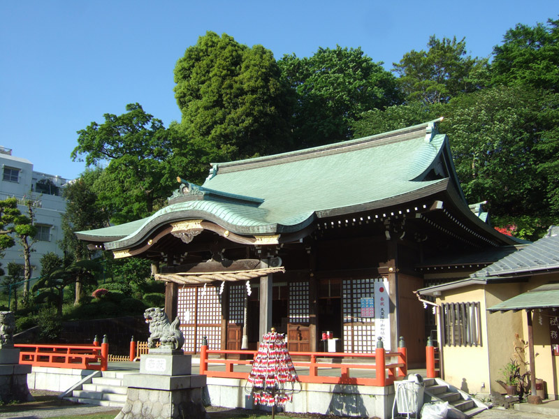 白幡八幡大神